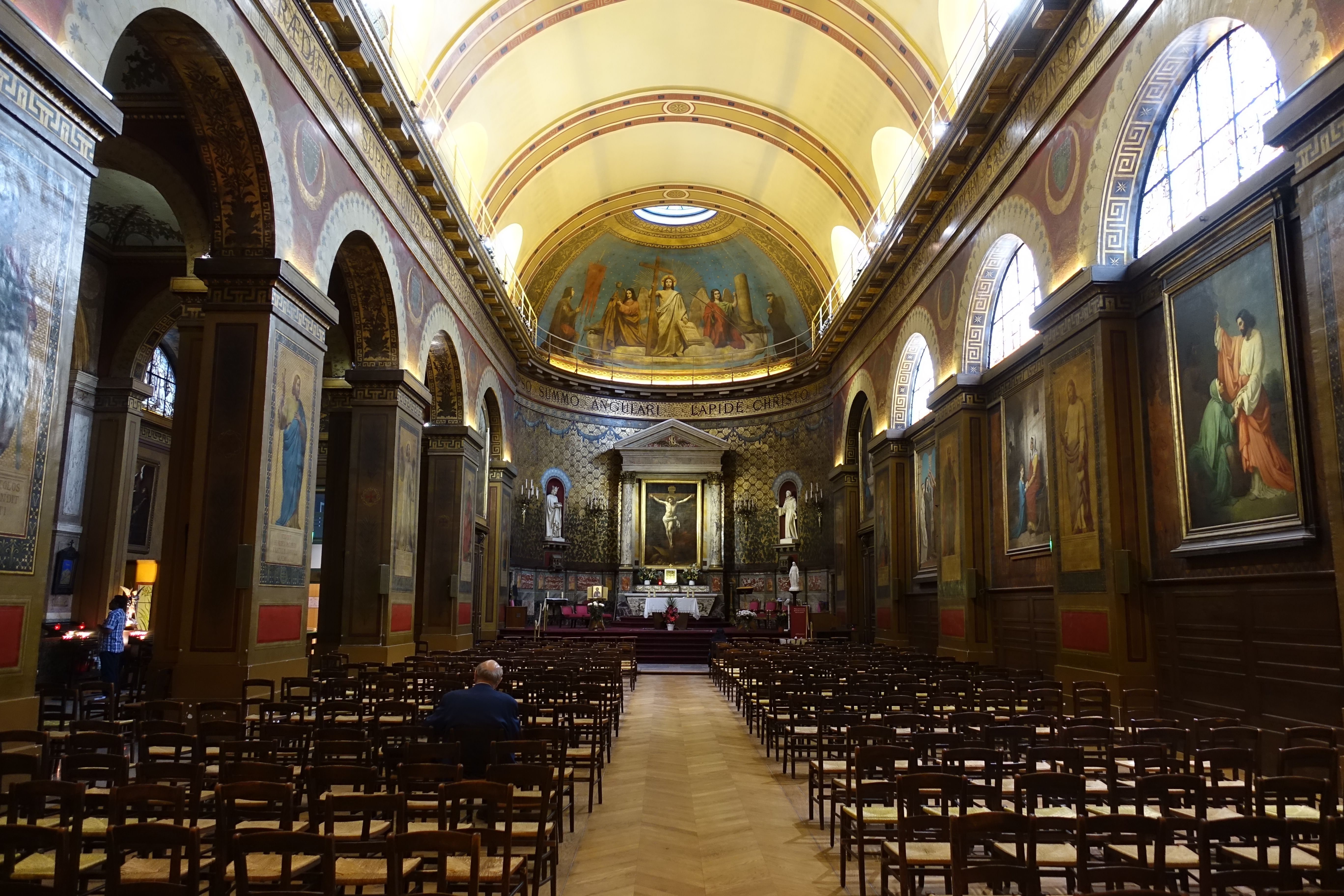 Eglise Saint-Louis d'Antin @ Paris